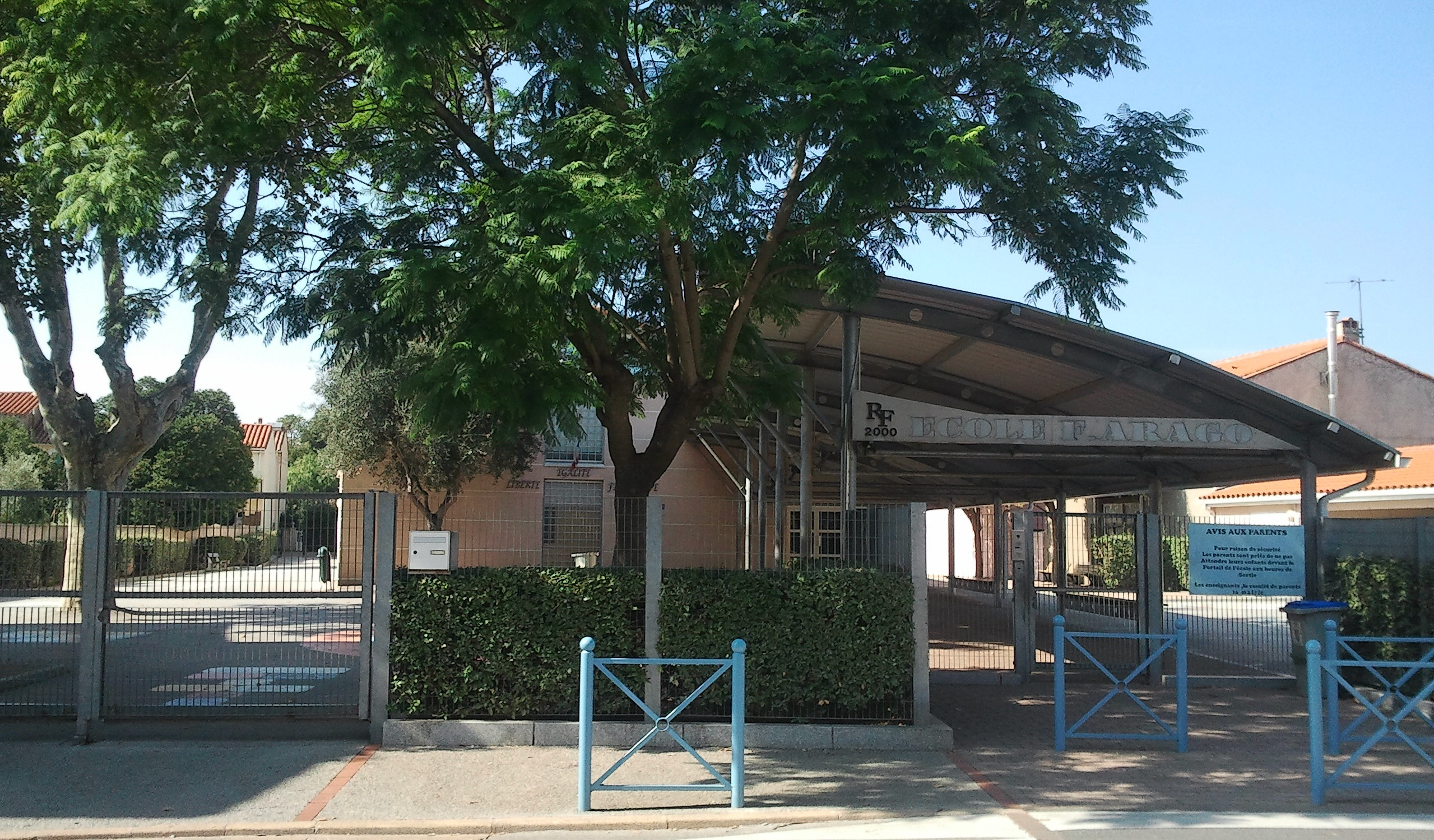 Ecole Arago à Bompas